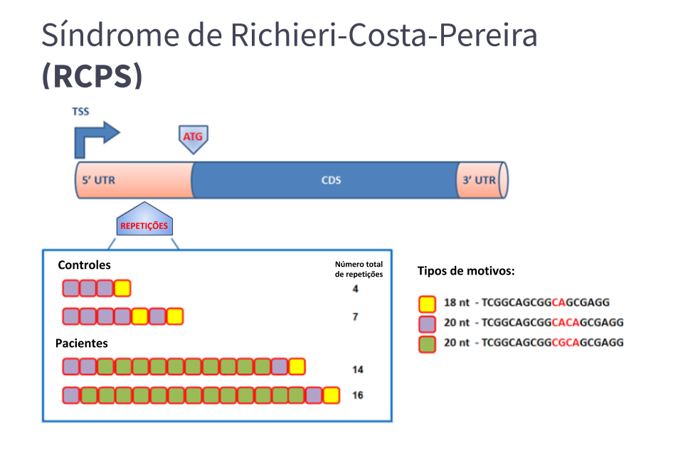 Esquema de motivos para Sindrome de Richieri-Costa Pereira